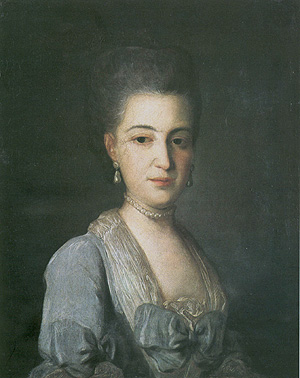 Анна Андреевна Остерман (1724—1769), в замужестве Толстая, дочь графа А.И. Остермана, бабка графа А.И. Остермана-Толстого.